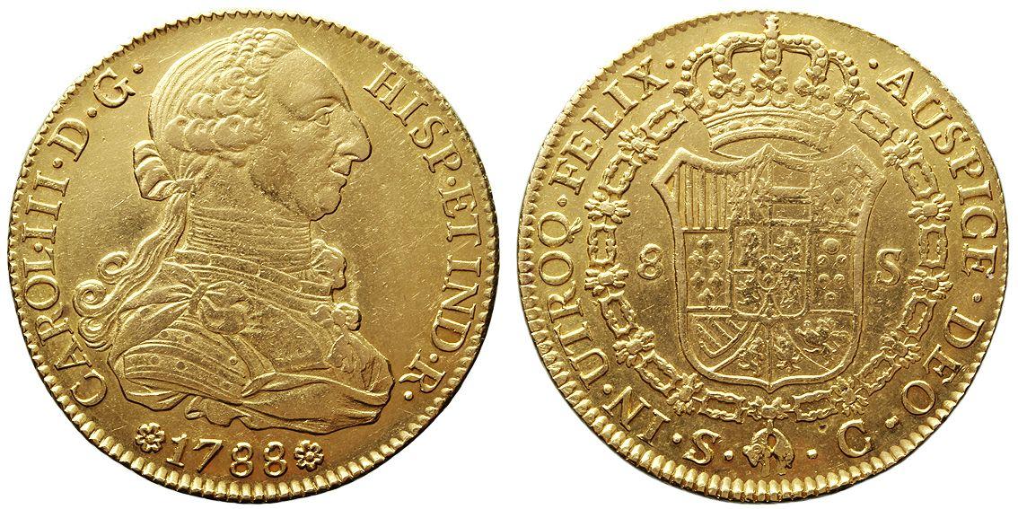 Moneda de vuit escuts encunyada en 1788 al regnat de Carles III d'Espanya. És una peça d'or fabricada a Sevilla.